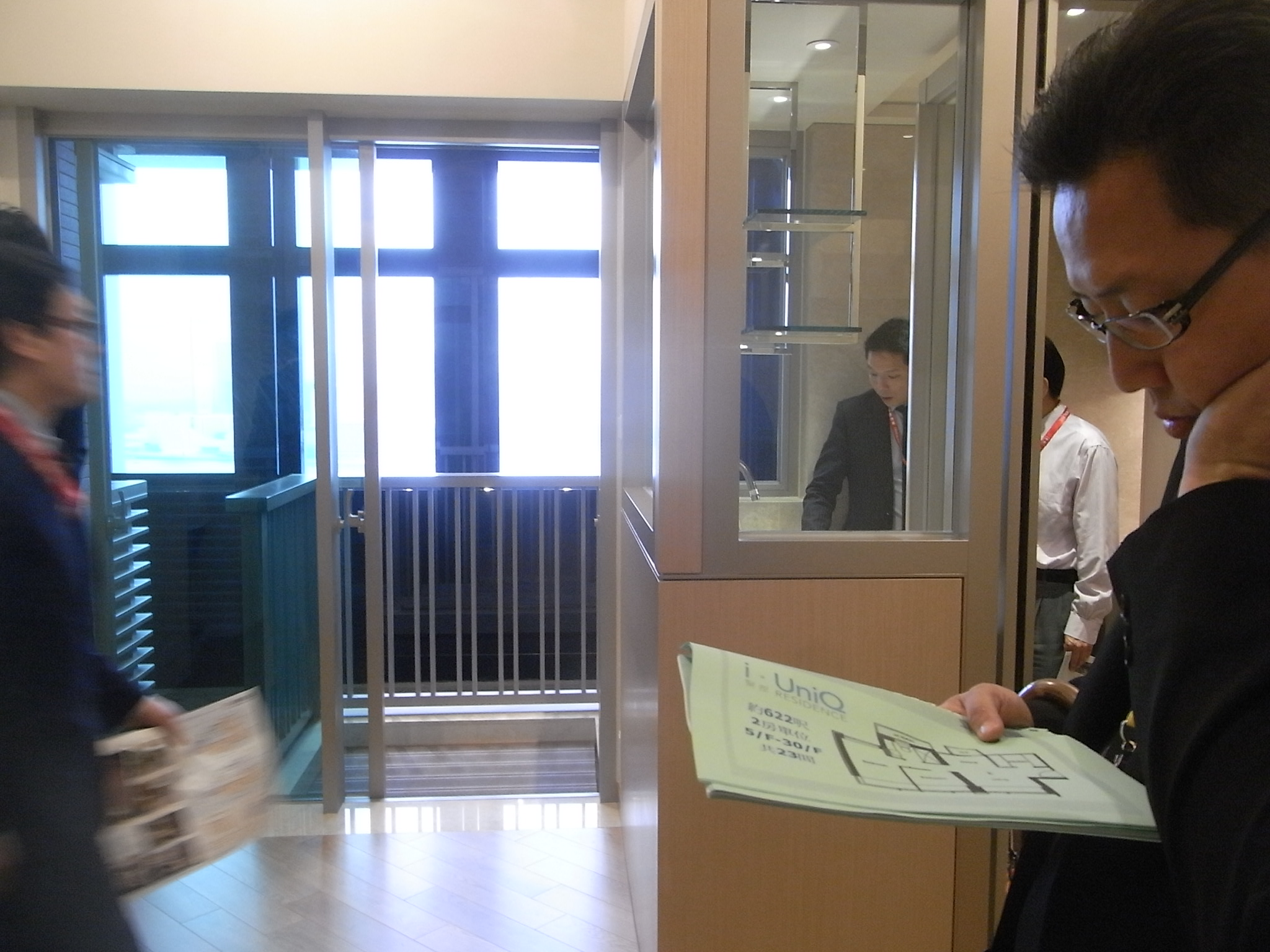 中文（香港）: 香港zh:新鴻基地產i·UniQ 譽都 Residence房展zh:示範單位